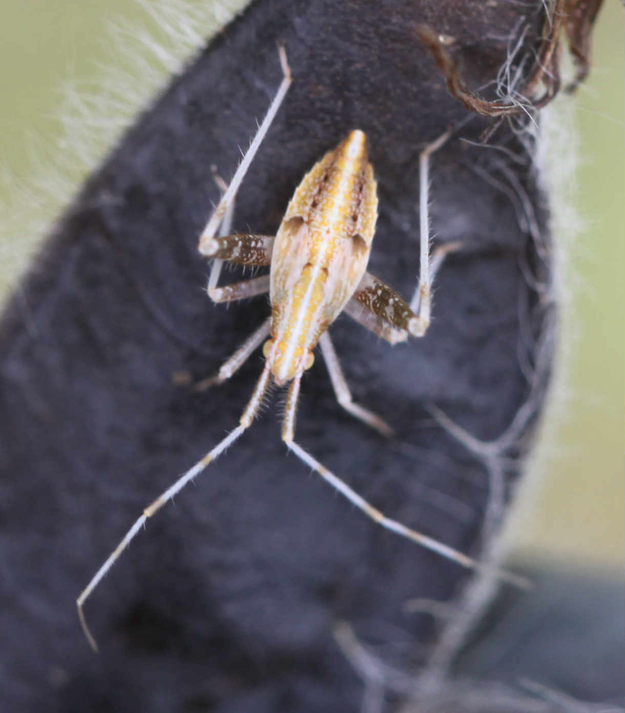 Nymphe von Phytocoris varipes am 30.6.2017 in der Schwetzinger Hardt